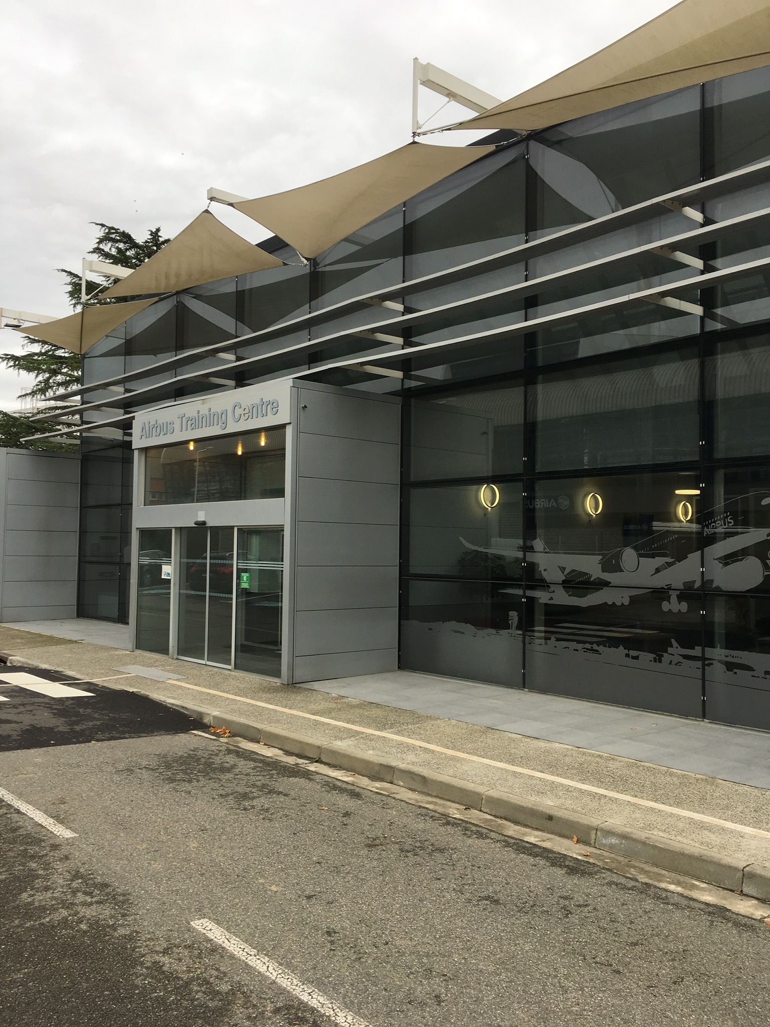 Entrée d’Airbus Training Centre à Blagnac, France